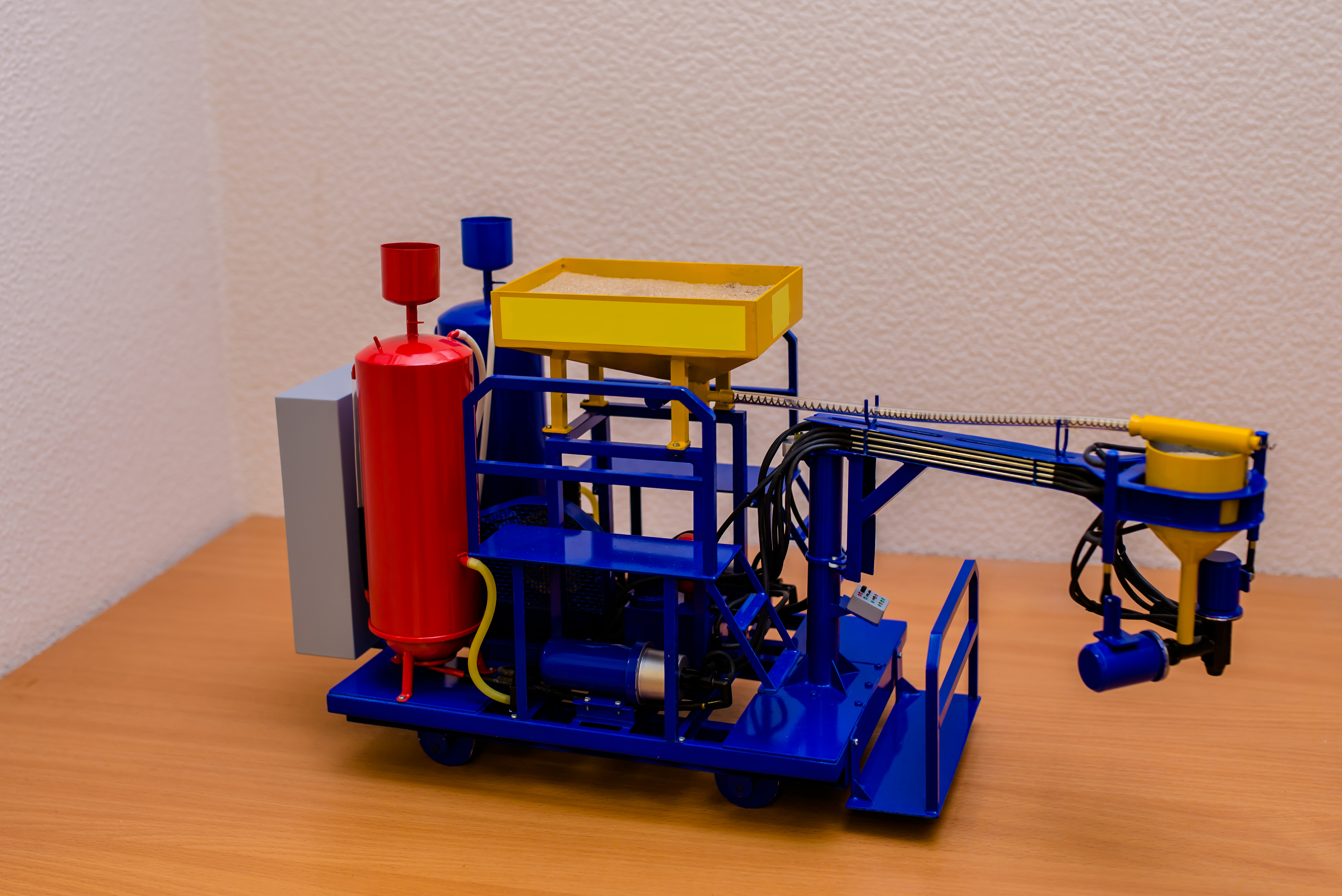 Модель трехкомпонентной заливочной машины в масштабе 1:10